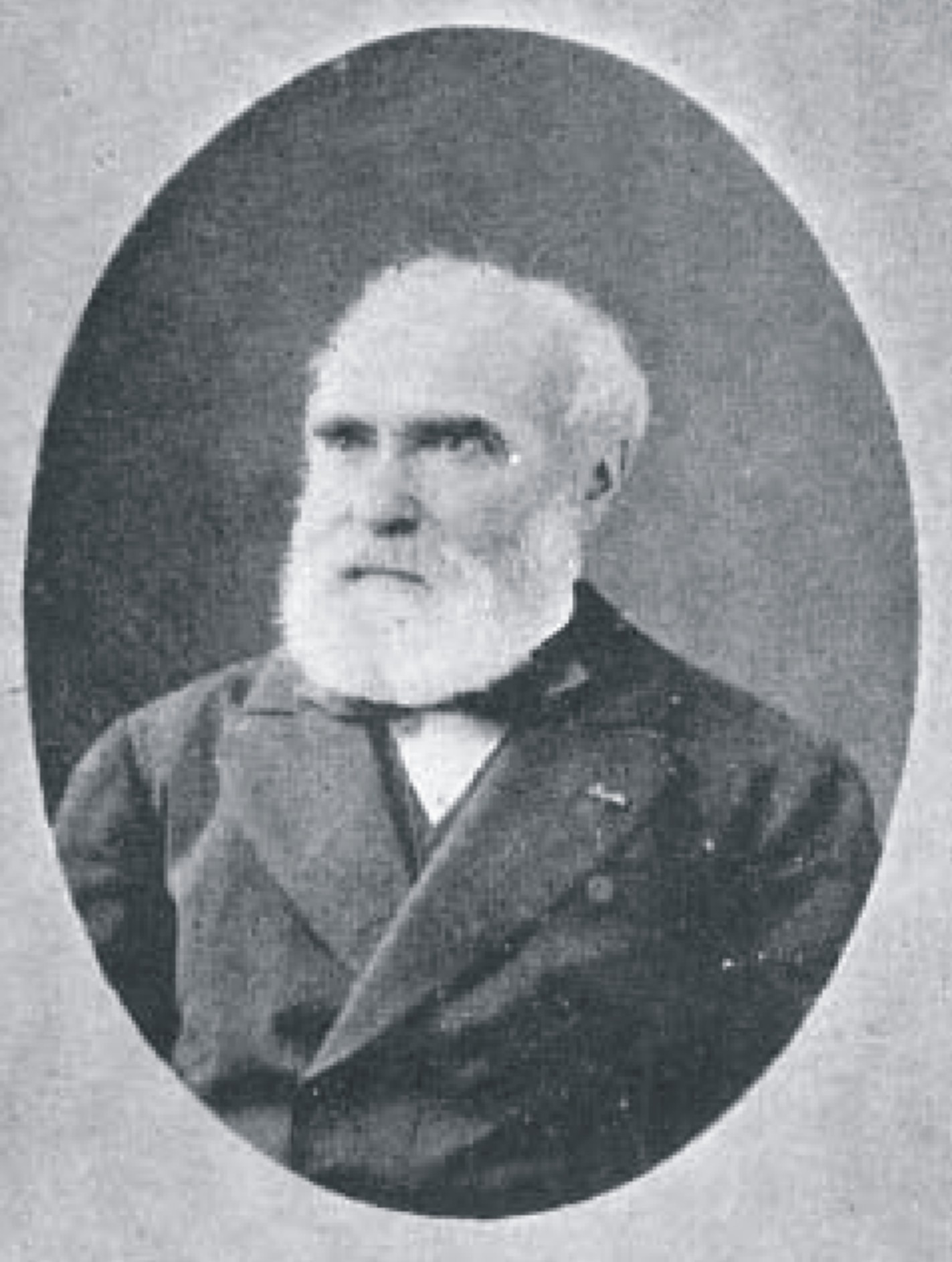 Foto von Denis Jourdanet (ca. um 1890)